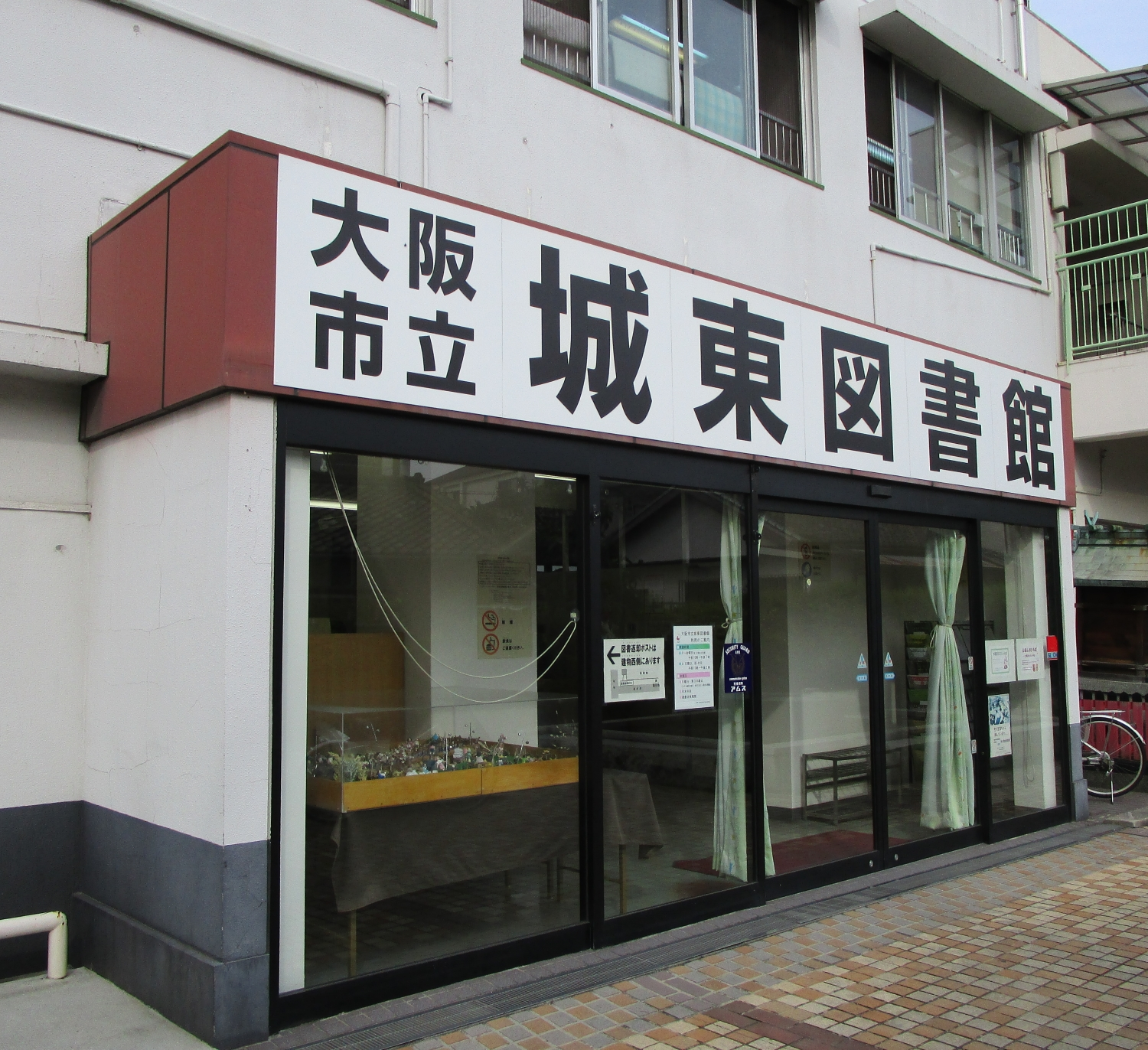 大阪市立城東図書館（仮図書館）